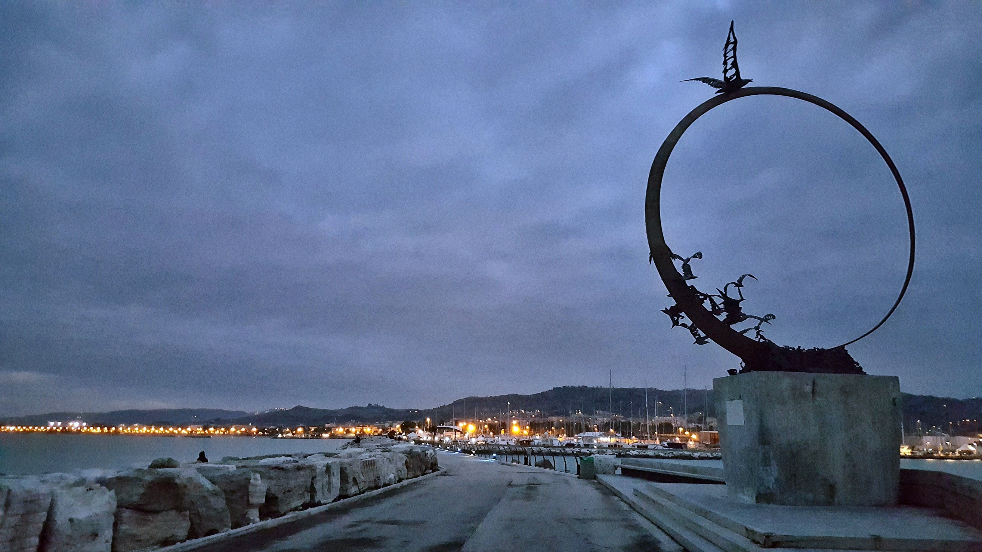 Monumento al Gabbiano Jonathan presso il molo sud di san Benedetto del tronto